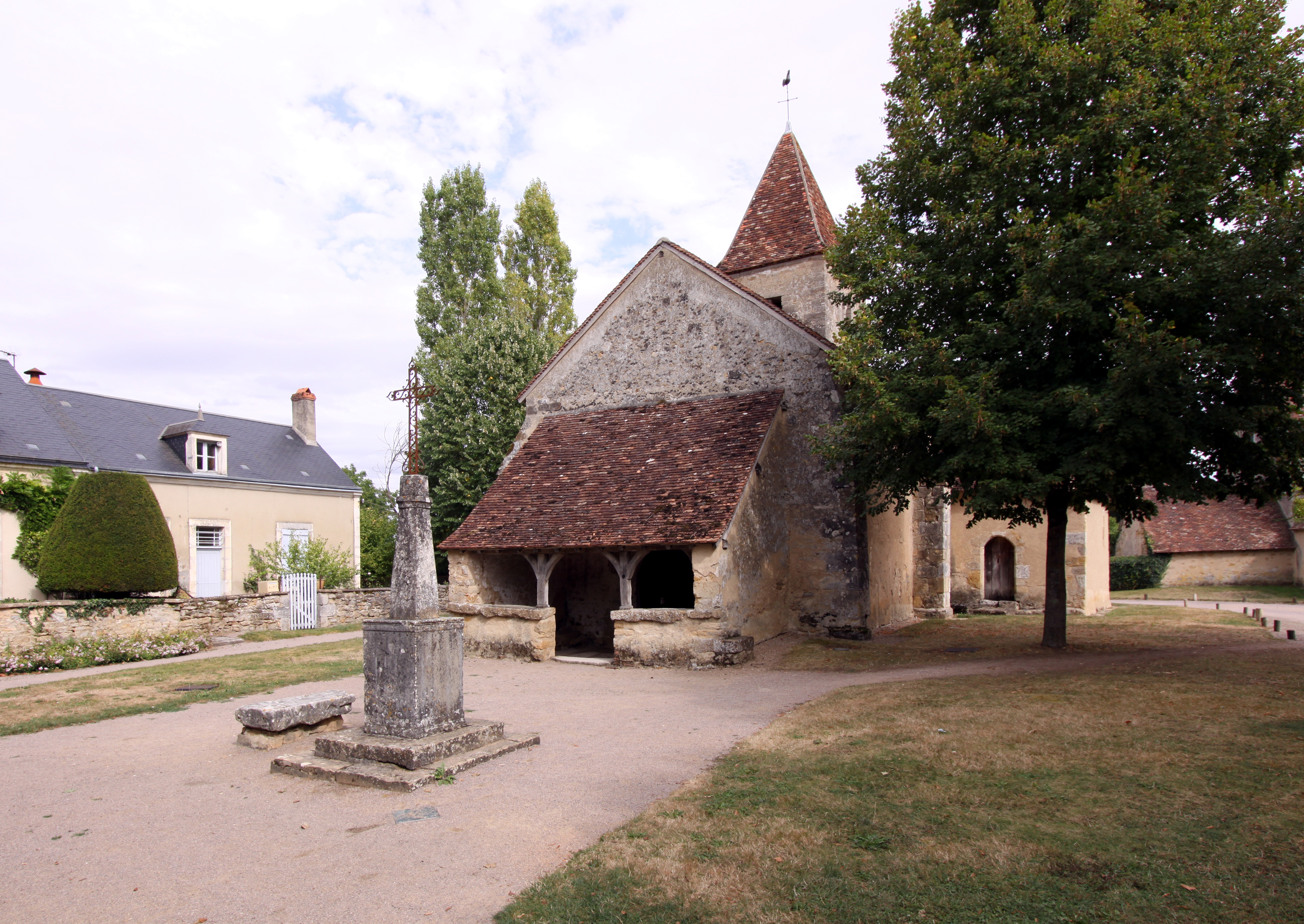 Dorfplatz im französischen Nohant/Indre, an dem sich das Maison de George Sand befindet